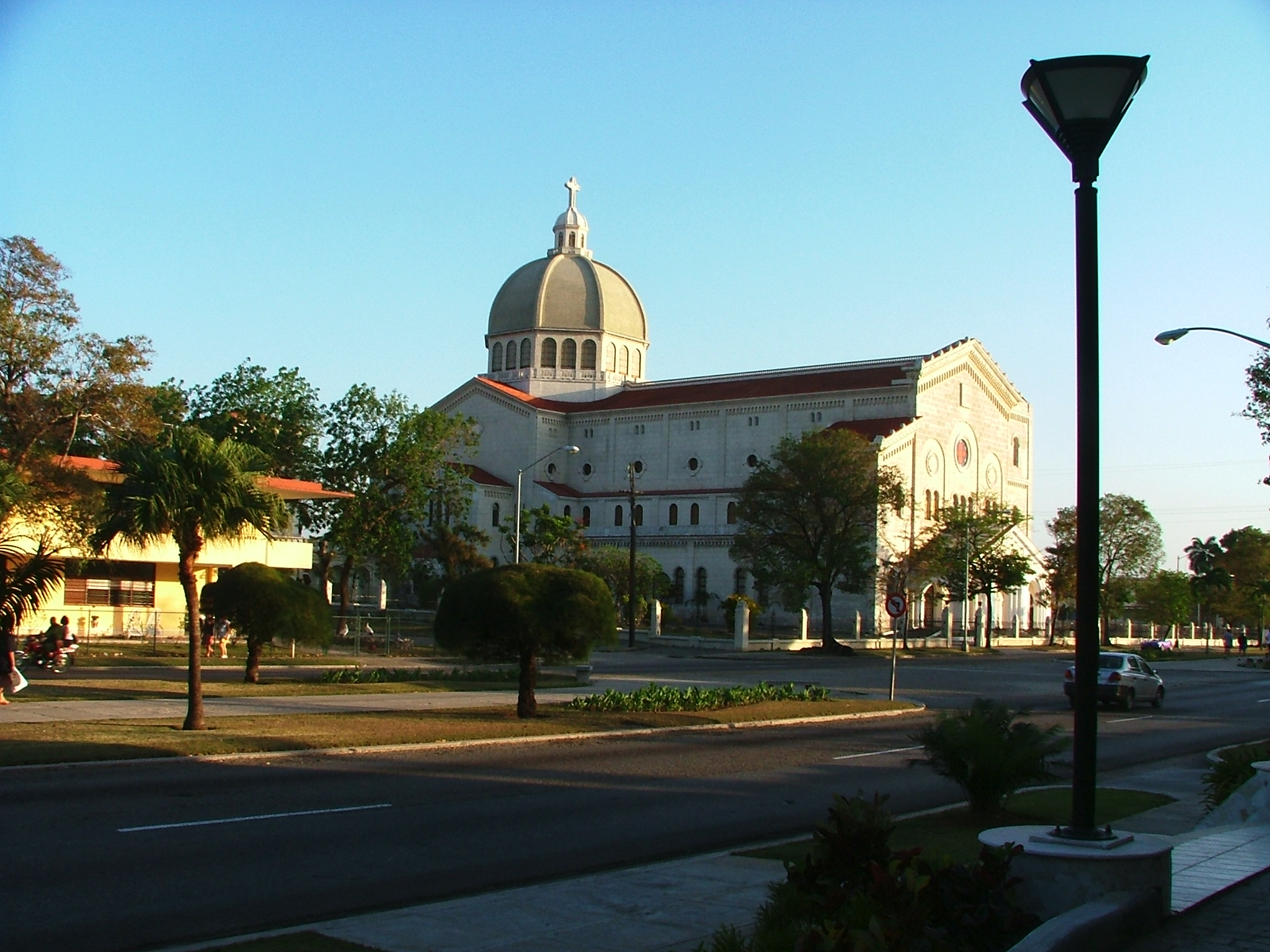 Iglesia San Antonio de Padua (1950) en 5ta avenida y calle 60 en la lujosa zona residencial de Miramar, municipio de Playa, Havana.